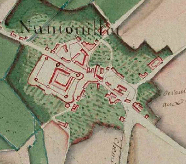 Vue du château de Nantouillet sur un plan d'intendance.